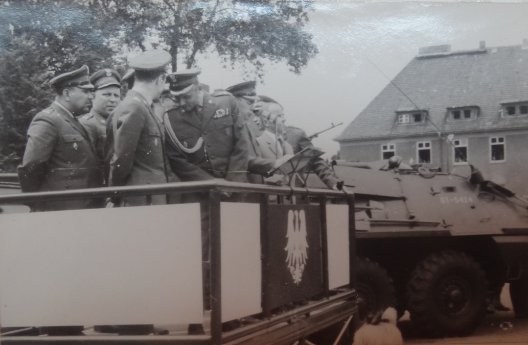 Garnizon Stargard Szczeciński, 1961r. Powstanie 45 bm.